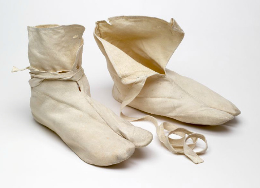 Японские носки таби образца начала XX века